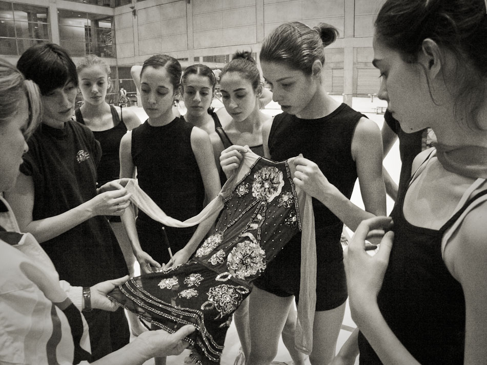 Las componentes del conjunto nacional de gimnasia rítmica junto a la entrenadora de conjuntos Rosa Menor y su ayudante Noelia Fernández durante un entrenamiento en el CAR de Madrid en diciembre de 2003.